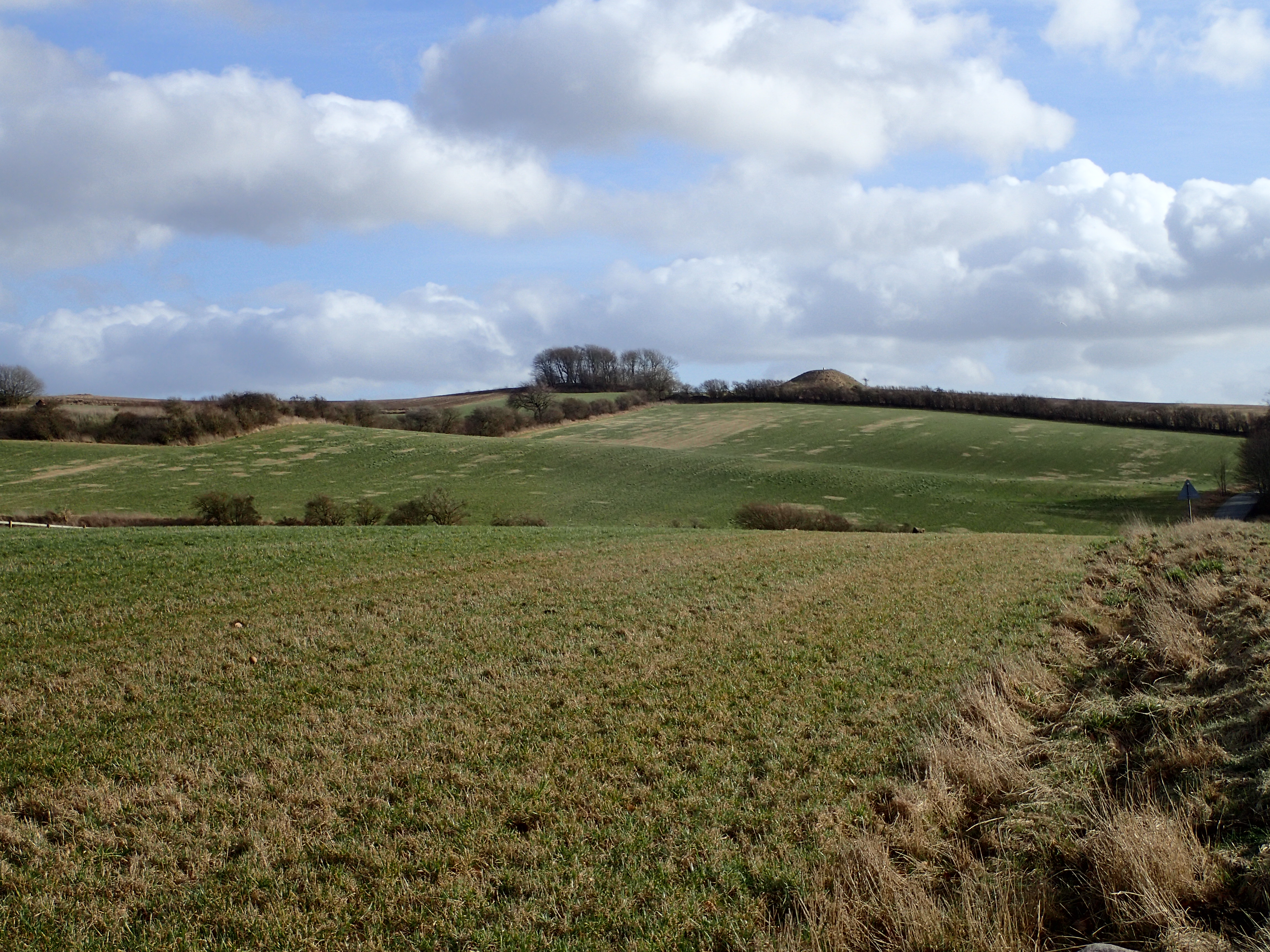 Jelshøj tidlig marts.